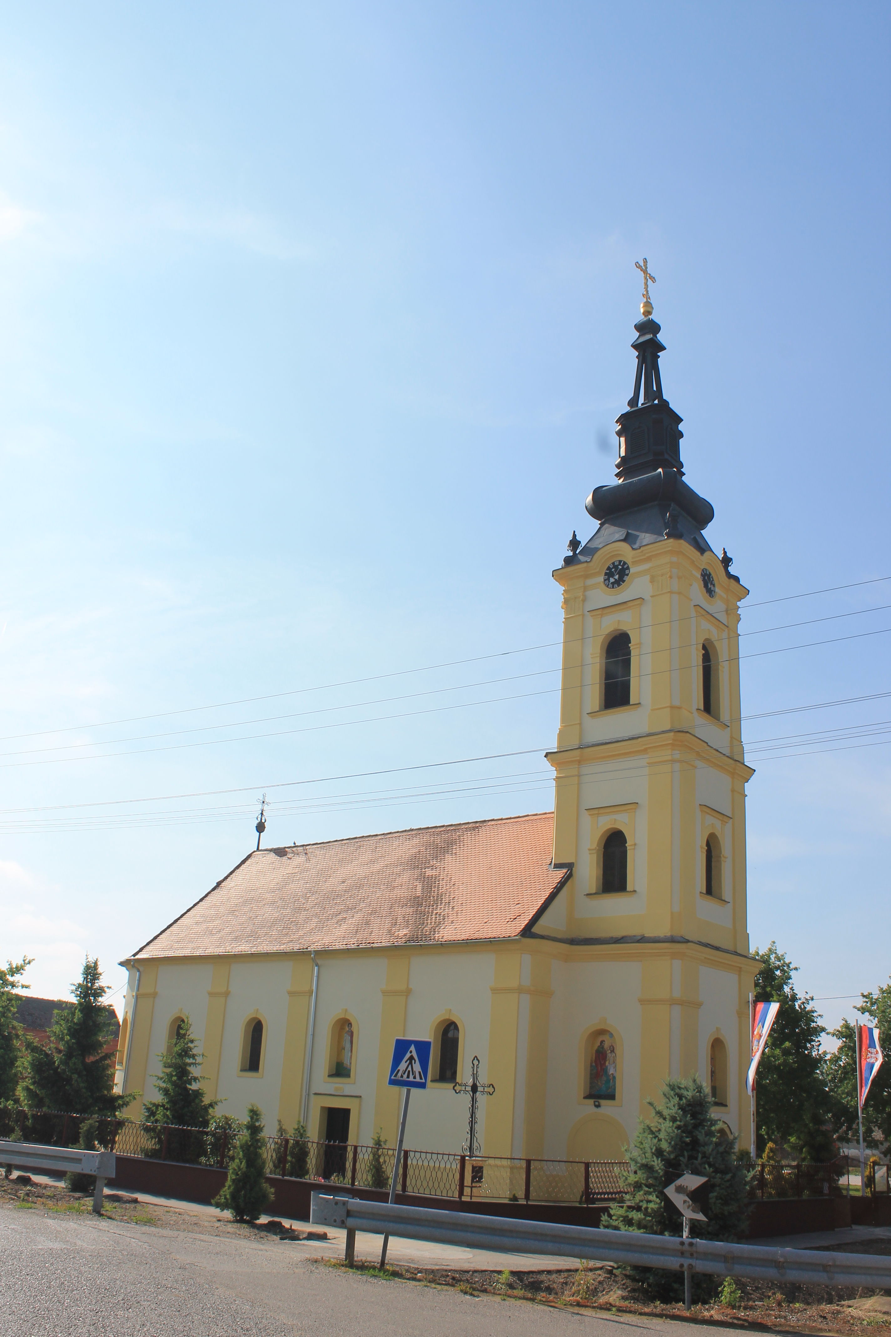 Crkva Sv. Nikole (Bačinci)